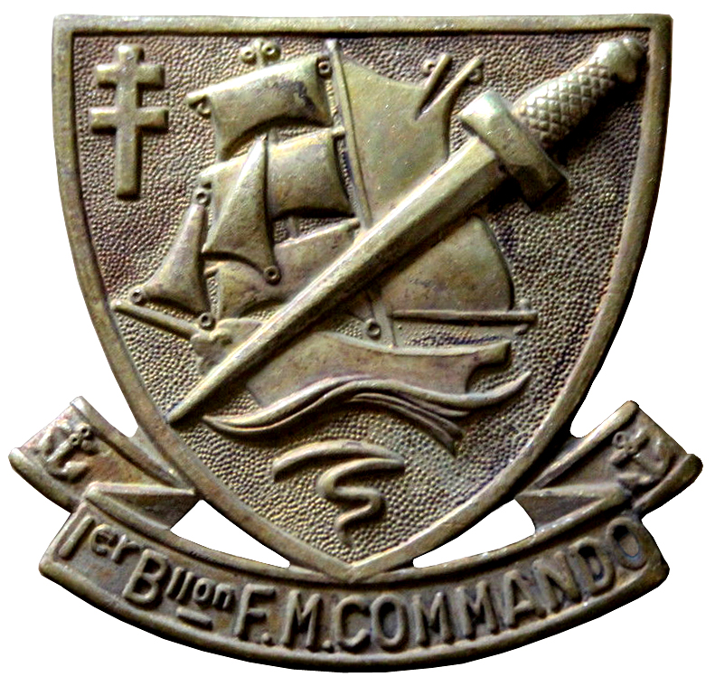 Insigne du 1er Bataillon de Fusiliers Marins Commandos dessiné par Maurice Chauvet en février 1944